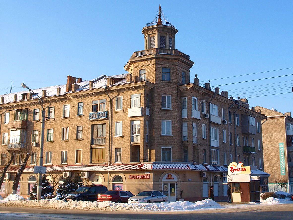 Сталинский ампир на ул.Оборонная, 5